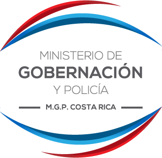 Logo del Ministerio de Gobernación y Policía (MGP), Costa Rica.